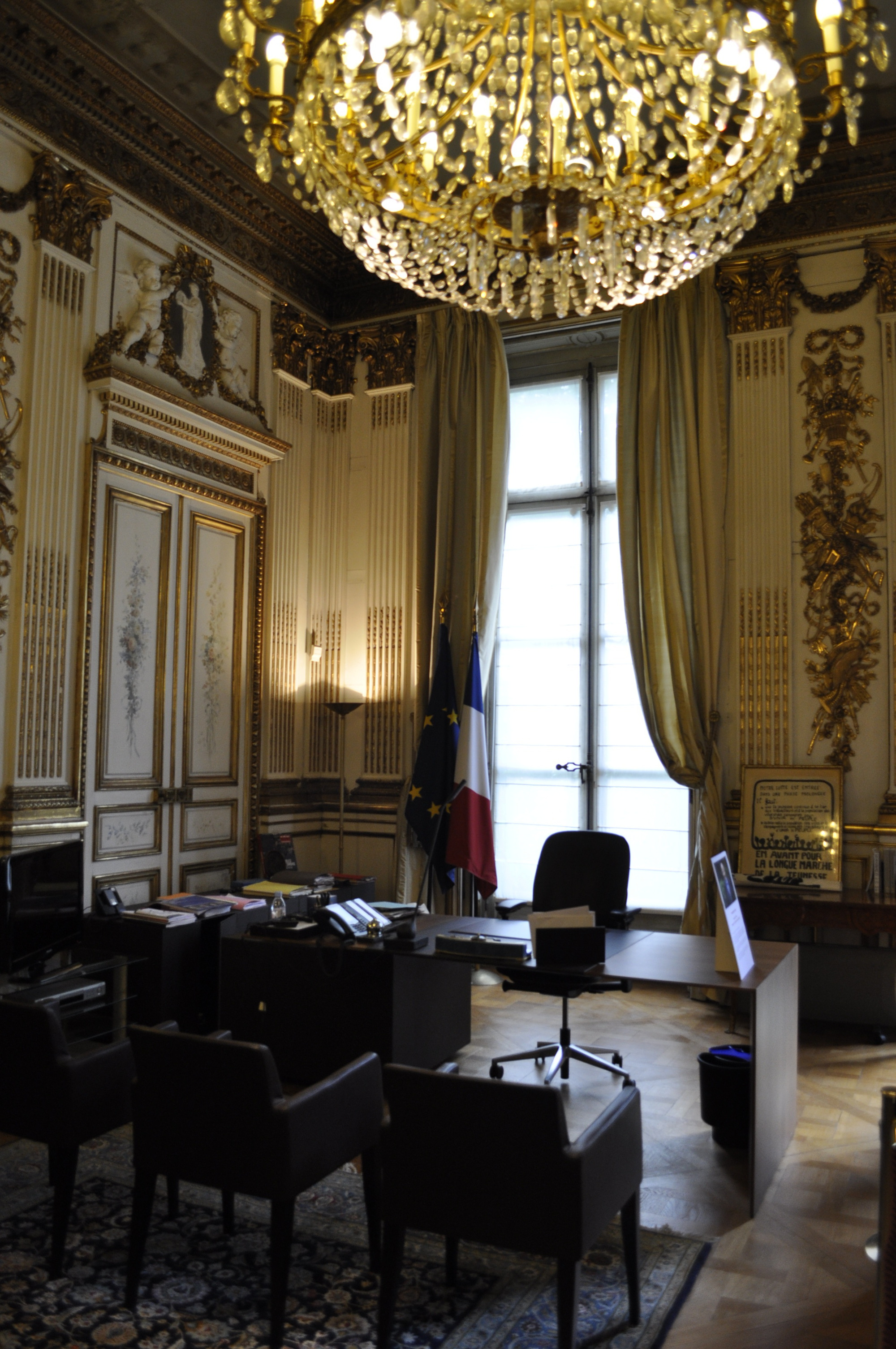 Bureau du secrétaire d'Etat des relations avec le Parlement à l'hôtel de Clermont. Jean-Marie Le Guen est le ministre en fonction Photo prise lors des journées européennes du patrimoine 2015 .